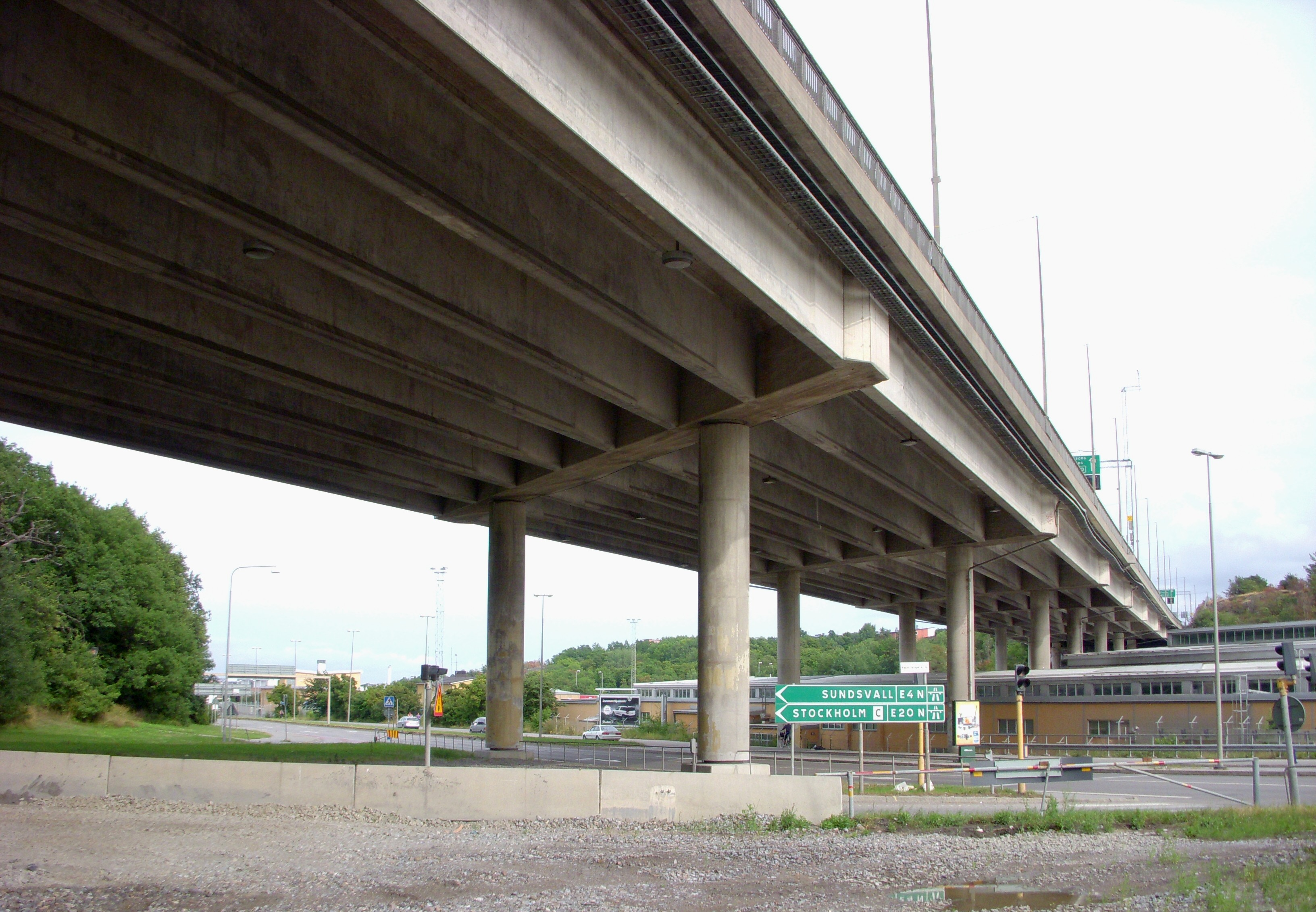 Hägerstensviadukten i Stockholm